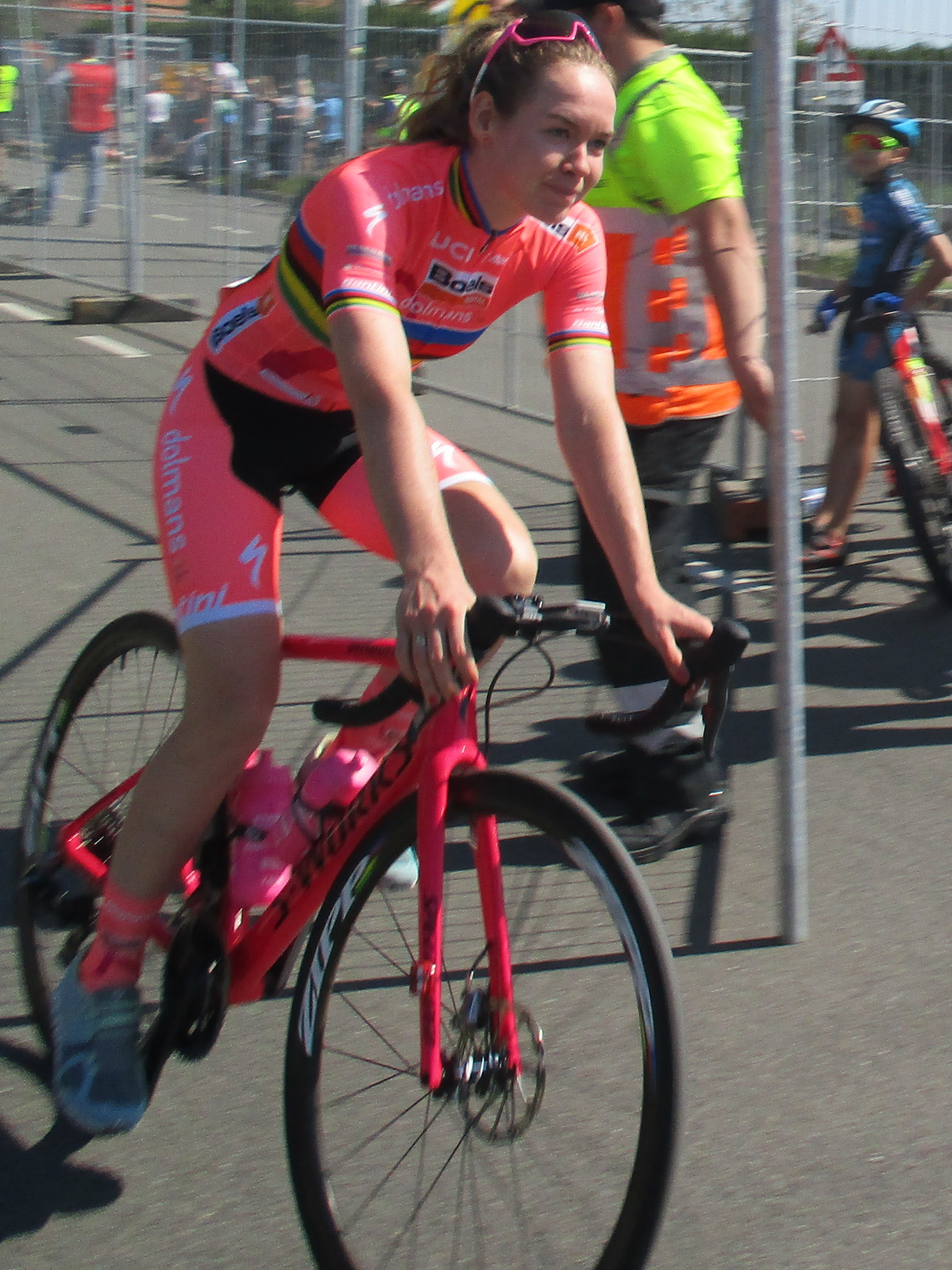 Finish van de Amstel Gold Race Ladies Edition 2019